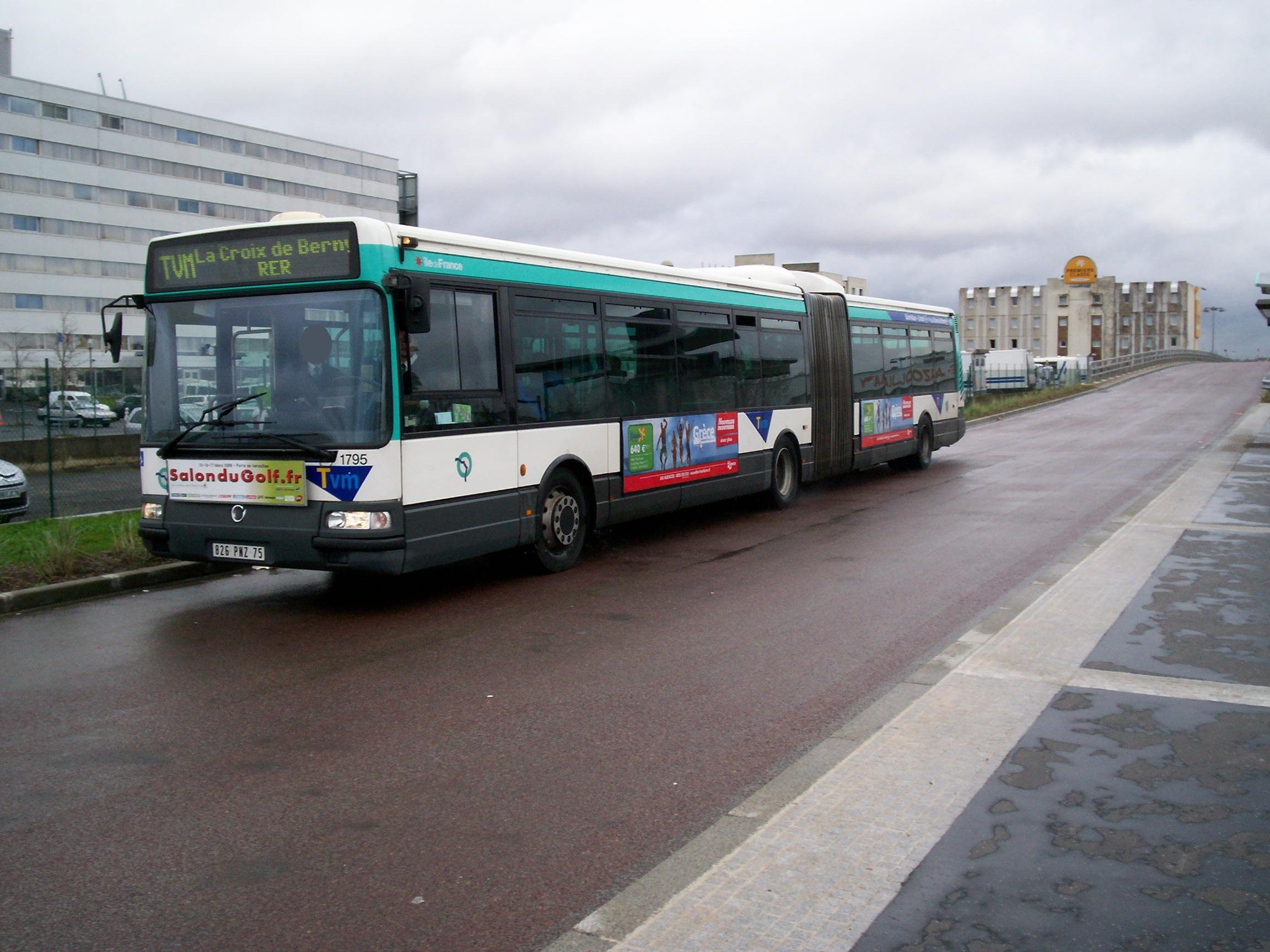 Bus Tvm arrivant au Delta et en direction de La Croix de Berny